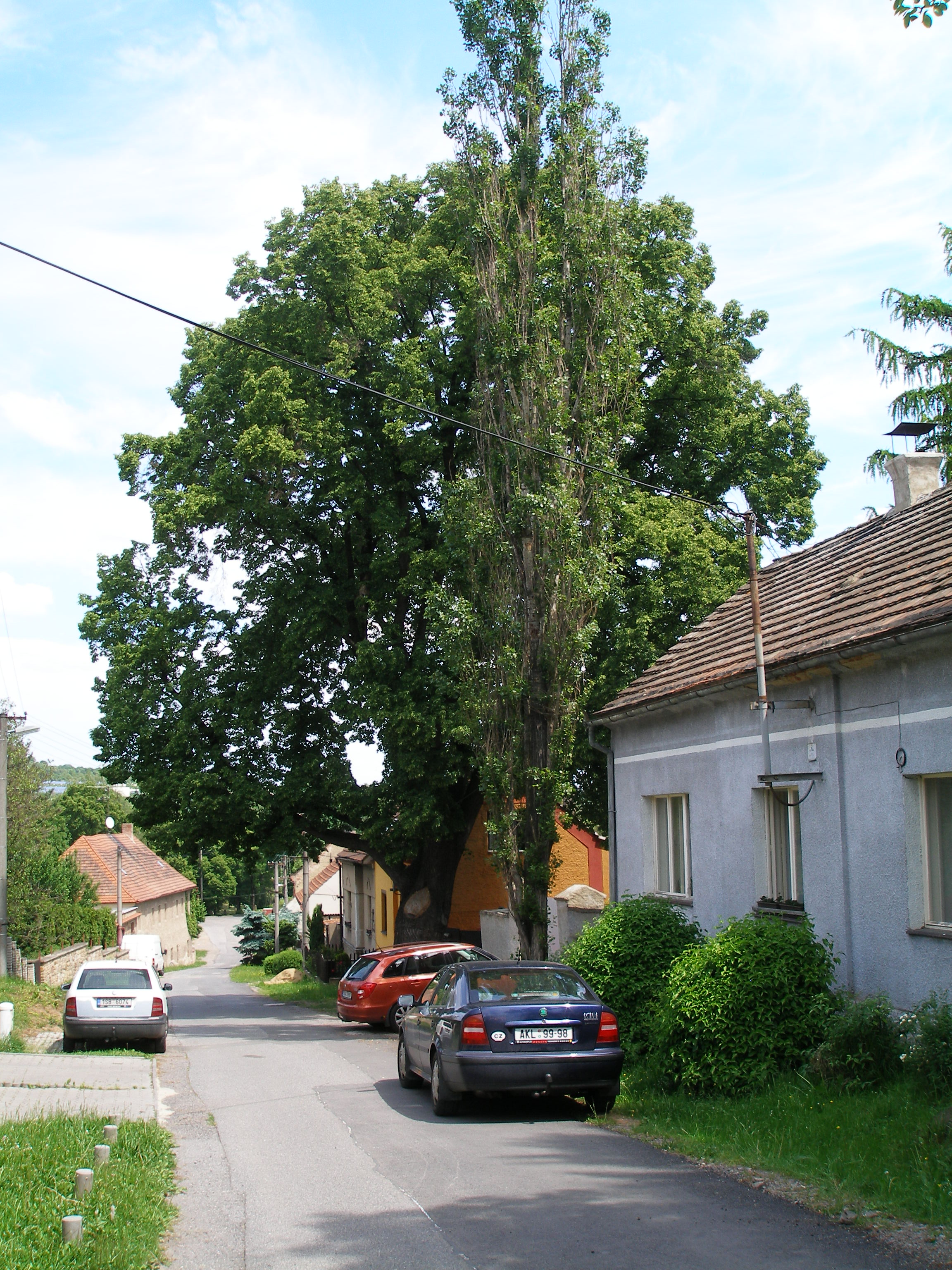 Památná lípa u čp. 114 v Podlešíně.